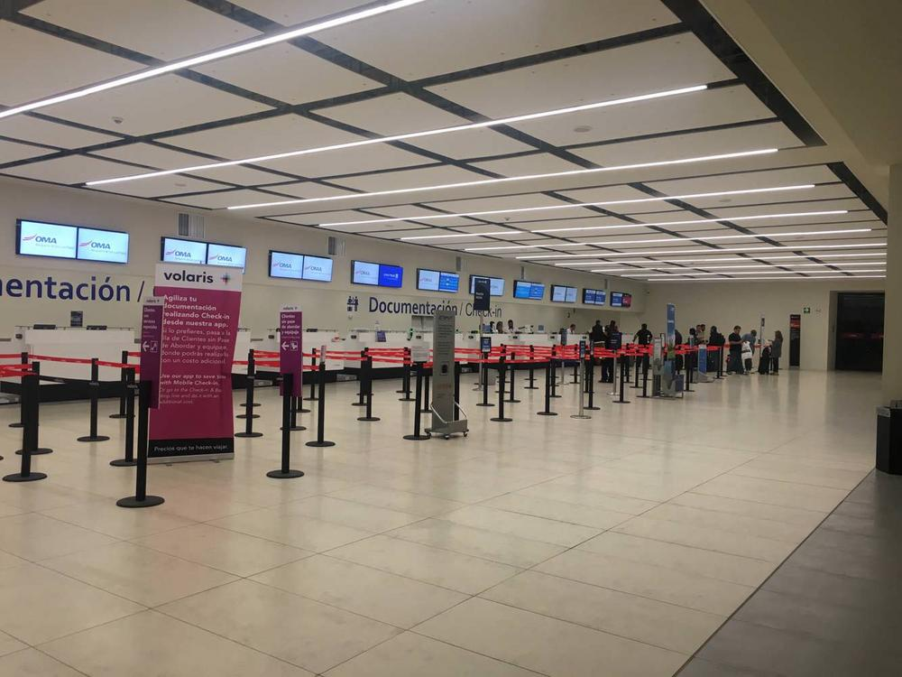 Mostradores de las distintas aerolíneas que operan en el Aeropuerto de San Luis Potosí